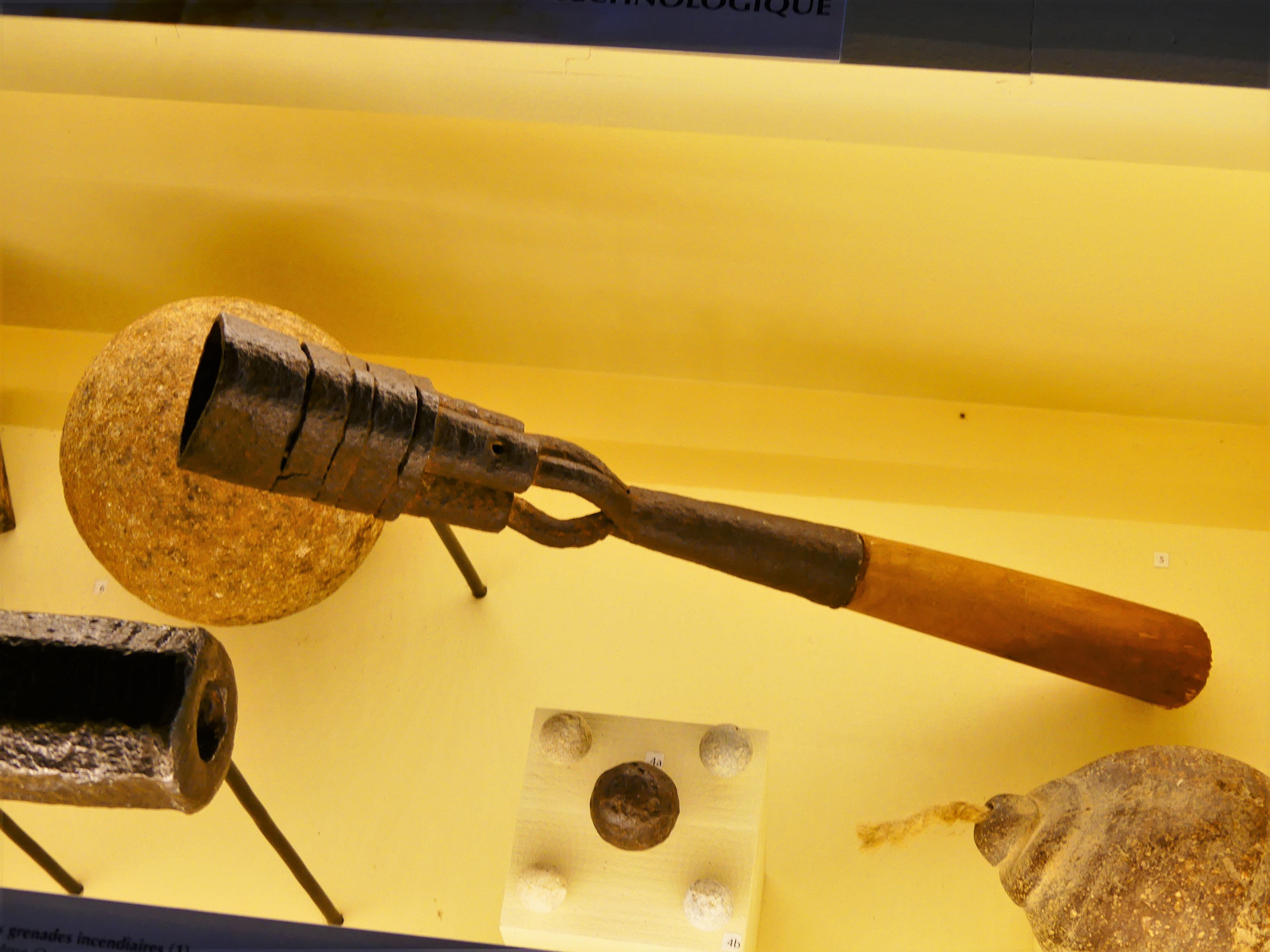 Bâton à feu à trois coups, château de Calmont d'Olt, Espalion, Aveyron, France.